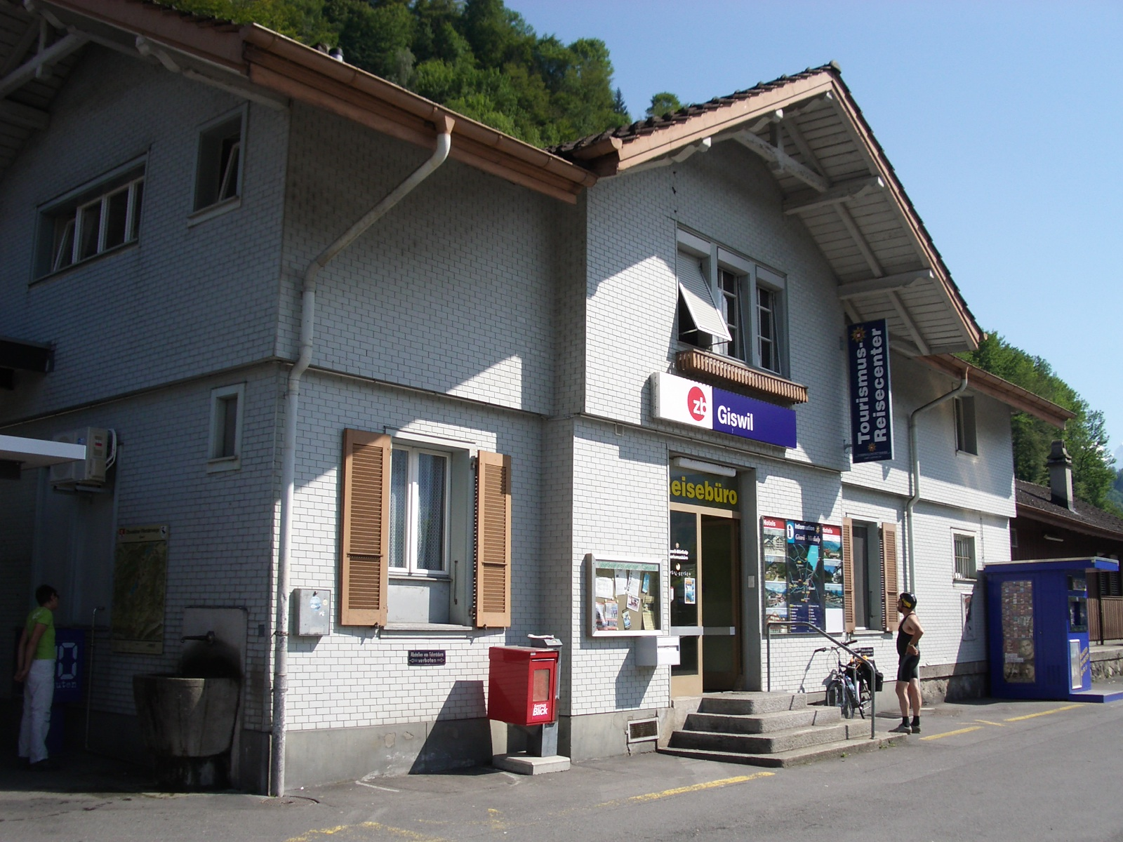 Giswil OW, Schweiz